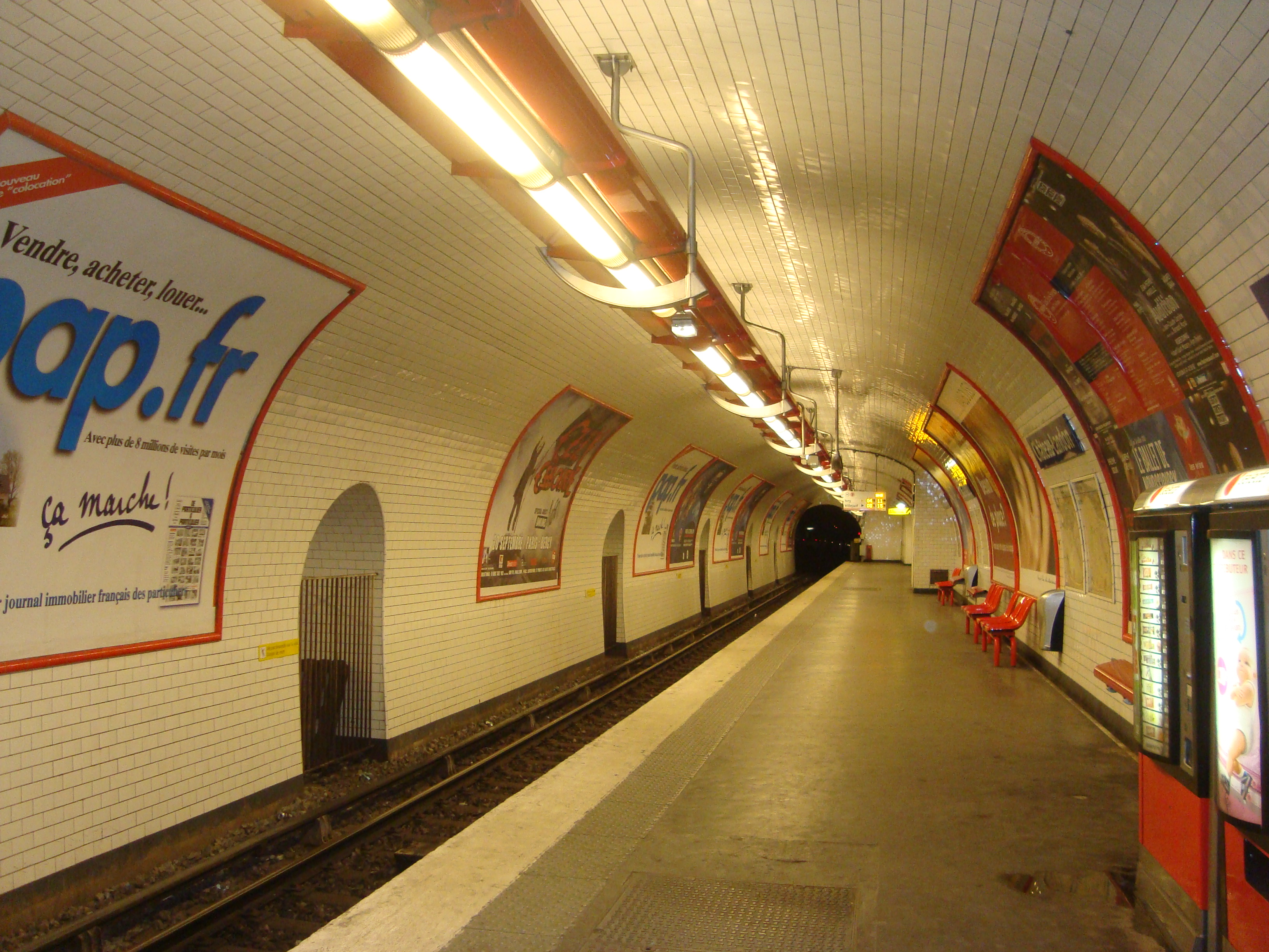 Quai de la station Chateau Landon sur la ligne 7. Vue vers la direction Ivry-Villejuif.